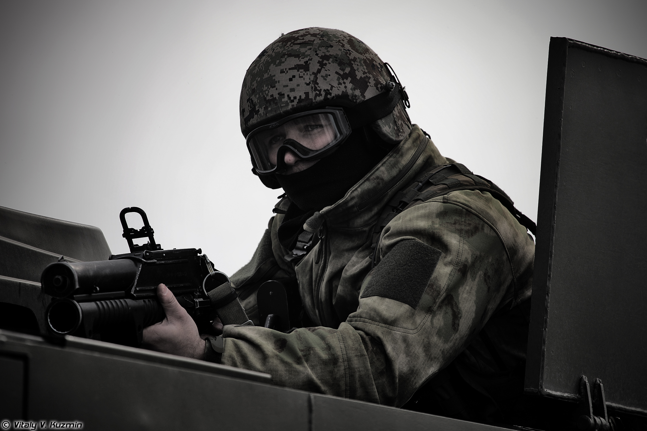 Военнослужащий 604-го ЦСН Витязь ВВ МВД России